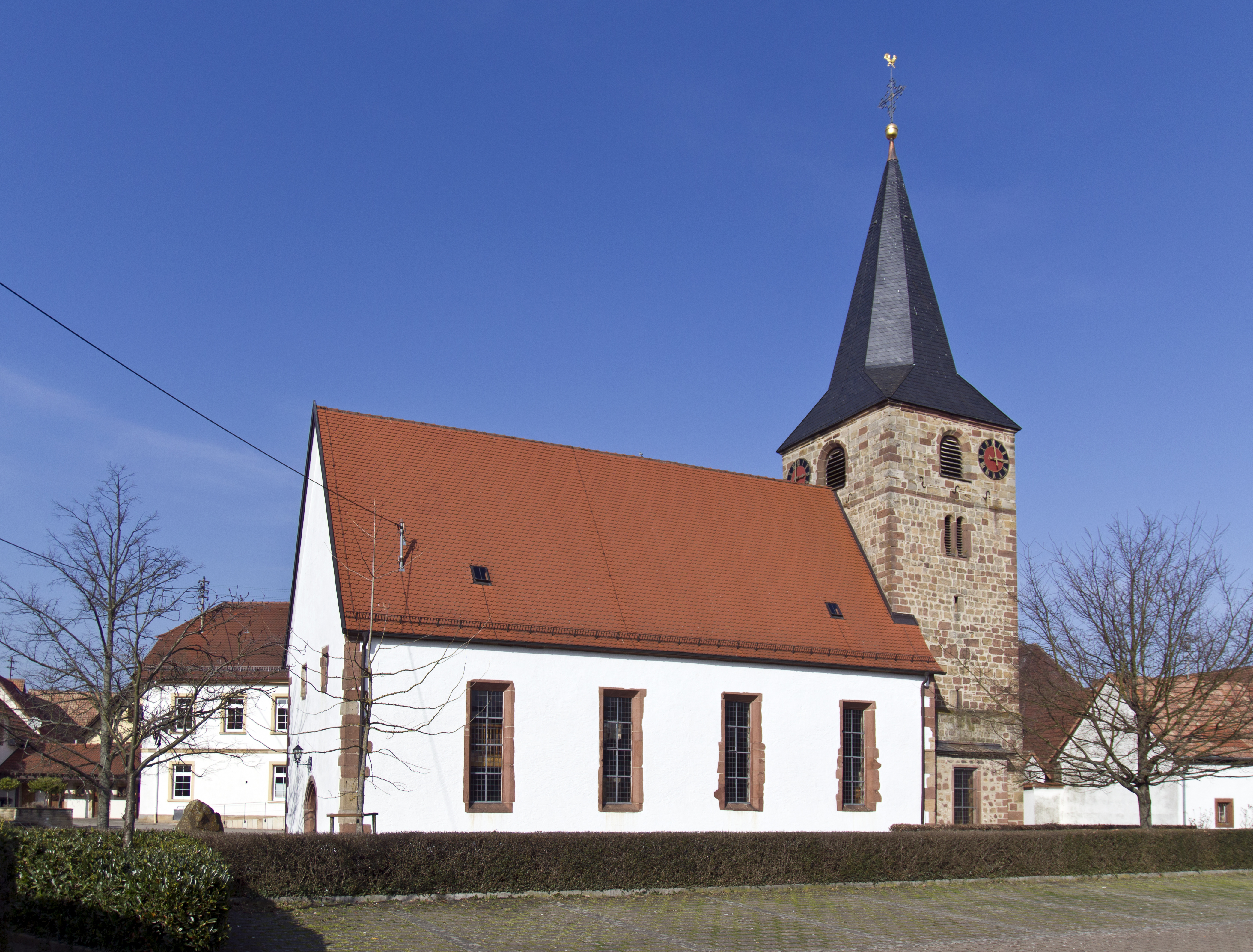 Oberotterbach, Protestantische Pfarrkirche, ehemals St. Georg; Chorturm um 1300, Glockengeschoss und Sakristei 16. Jahrhundert, spätgotischer Saal 1537, Umbau 1726